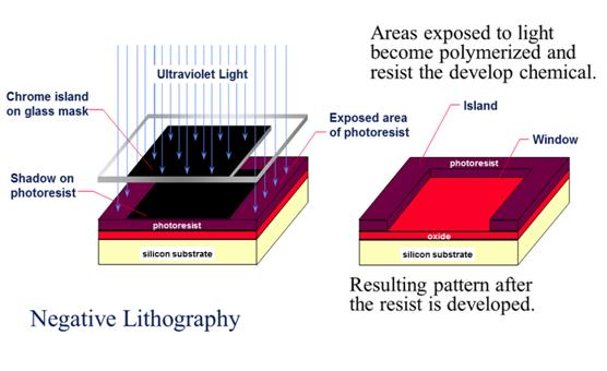 شکل 6- شماتیکی از فرایند EUVL با ماده مقاوم منفی